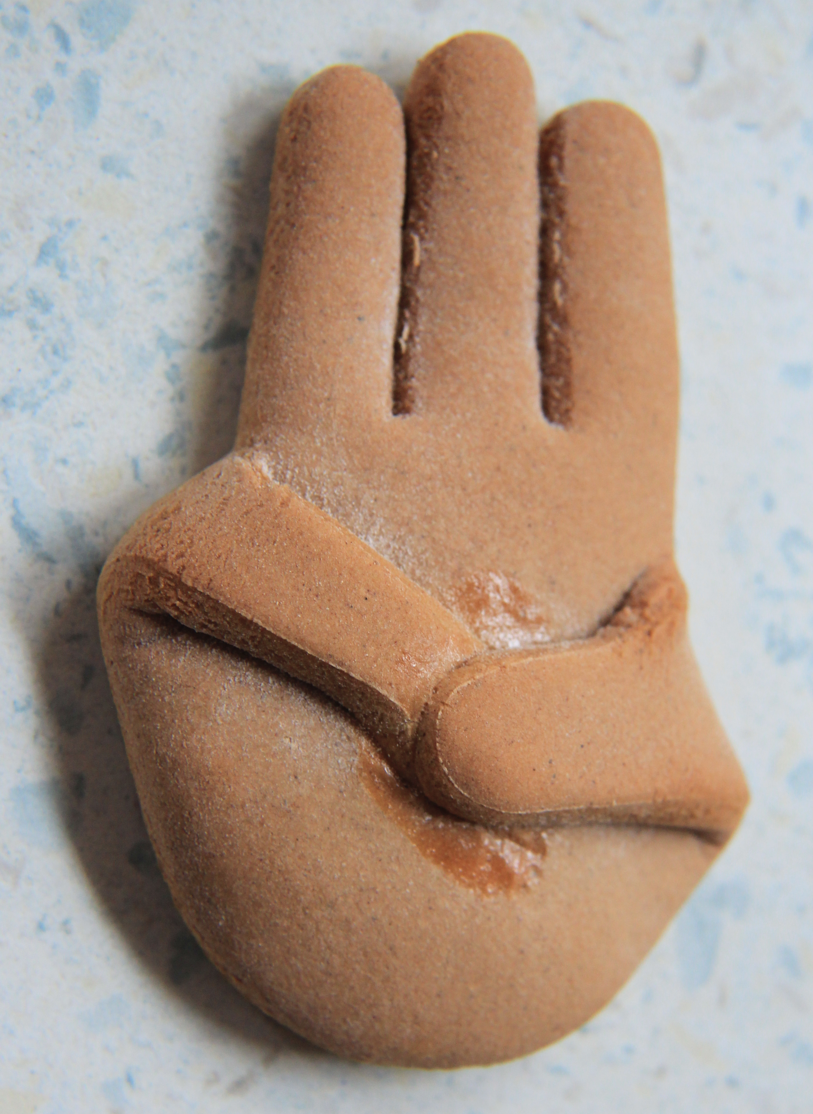 Lebkuchen in Form des Pfadfindergrußes - gesehen im BZ Wassergspreng